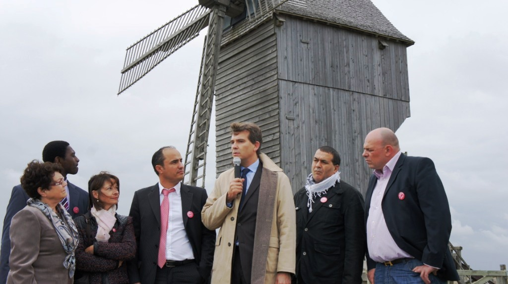 Montebourg devant le moulin de Valmy lors de sa campagne lanouvelleFrance pour être le candidat de son parti en 2012 . Alexandre Tunc en cravate rose est conseillé général de la Marne .